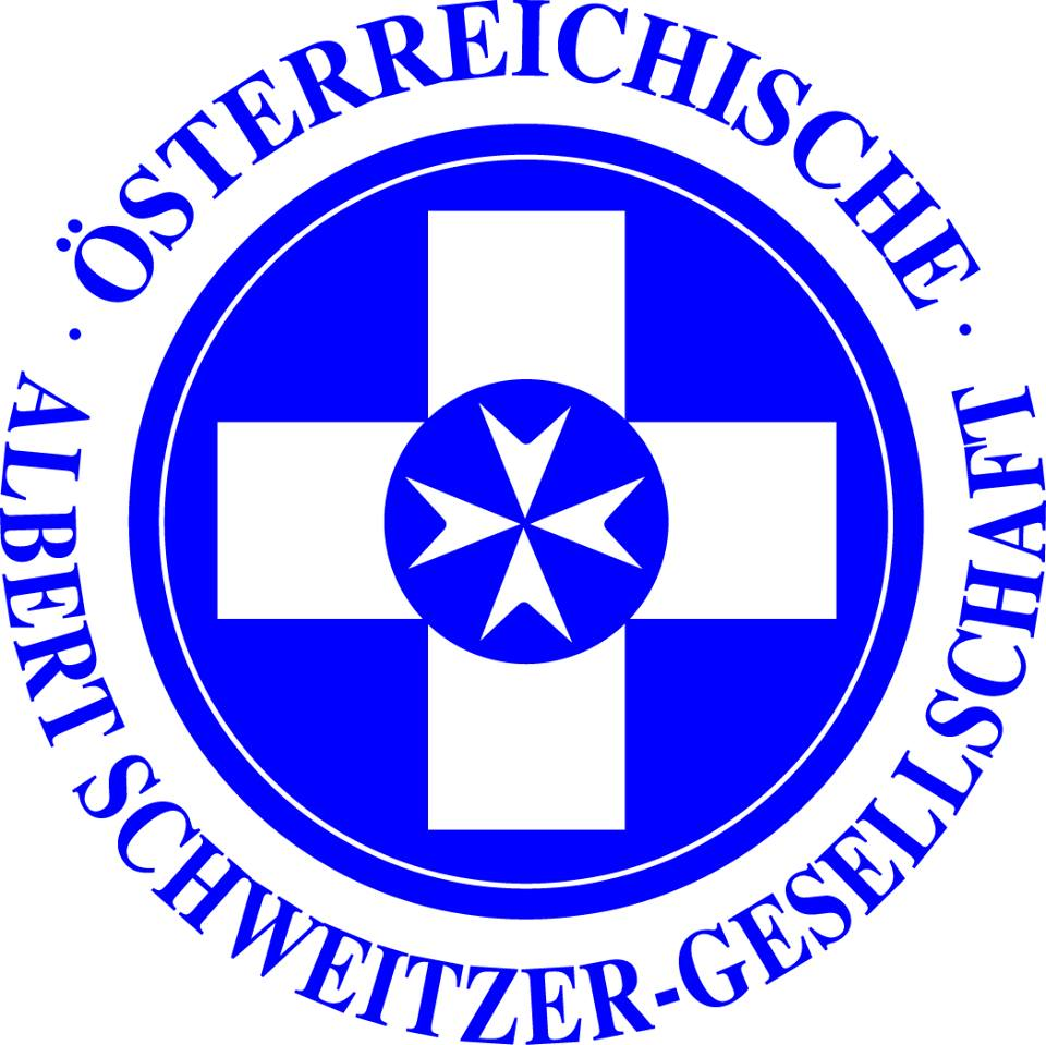 Logo der Österreichischen Albert Schweitzer-Gesellschaft